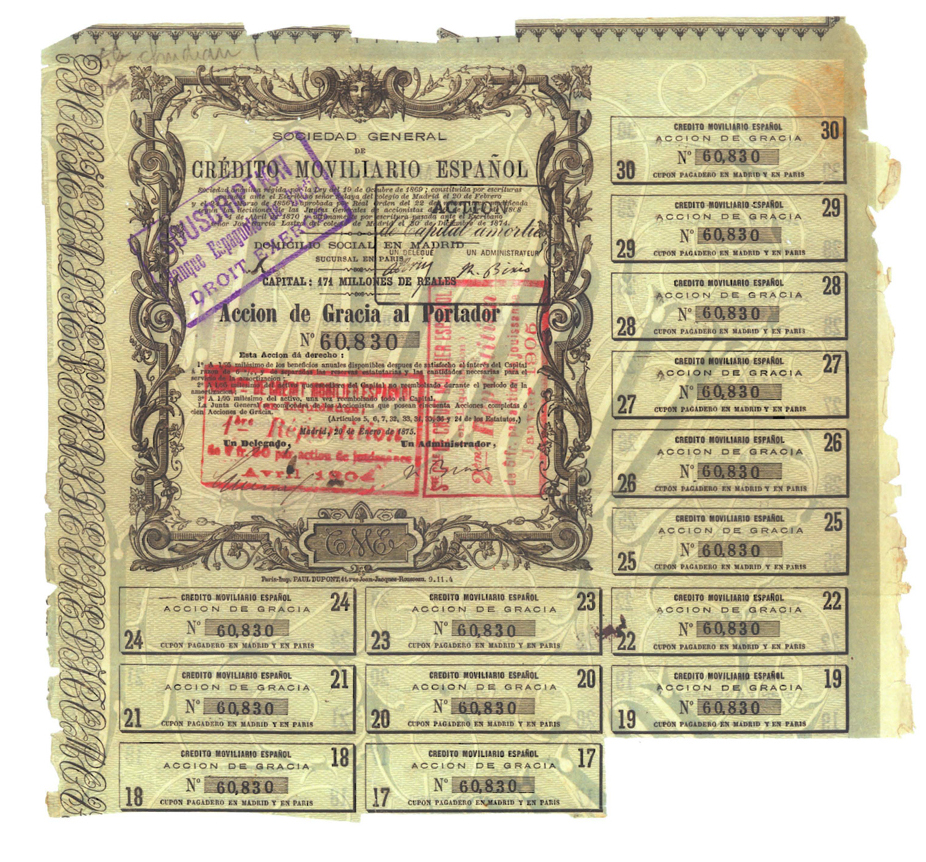 Acción - Sociedad General de Crédito Mobiliario Español (1874). Texto en castellano y valor en francos. Sociedad igual a la anterior